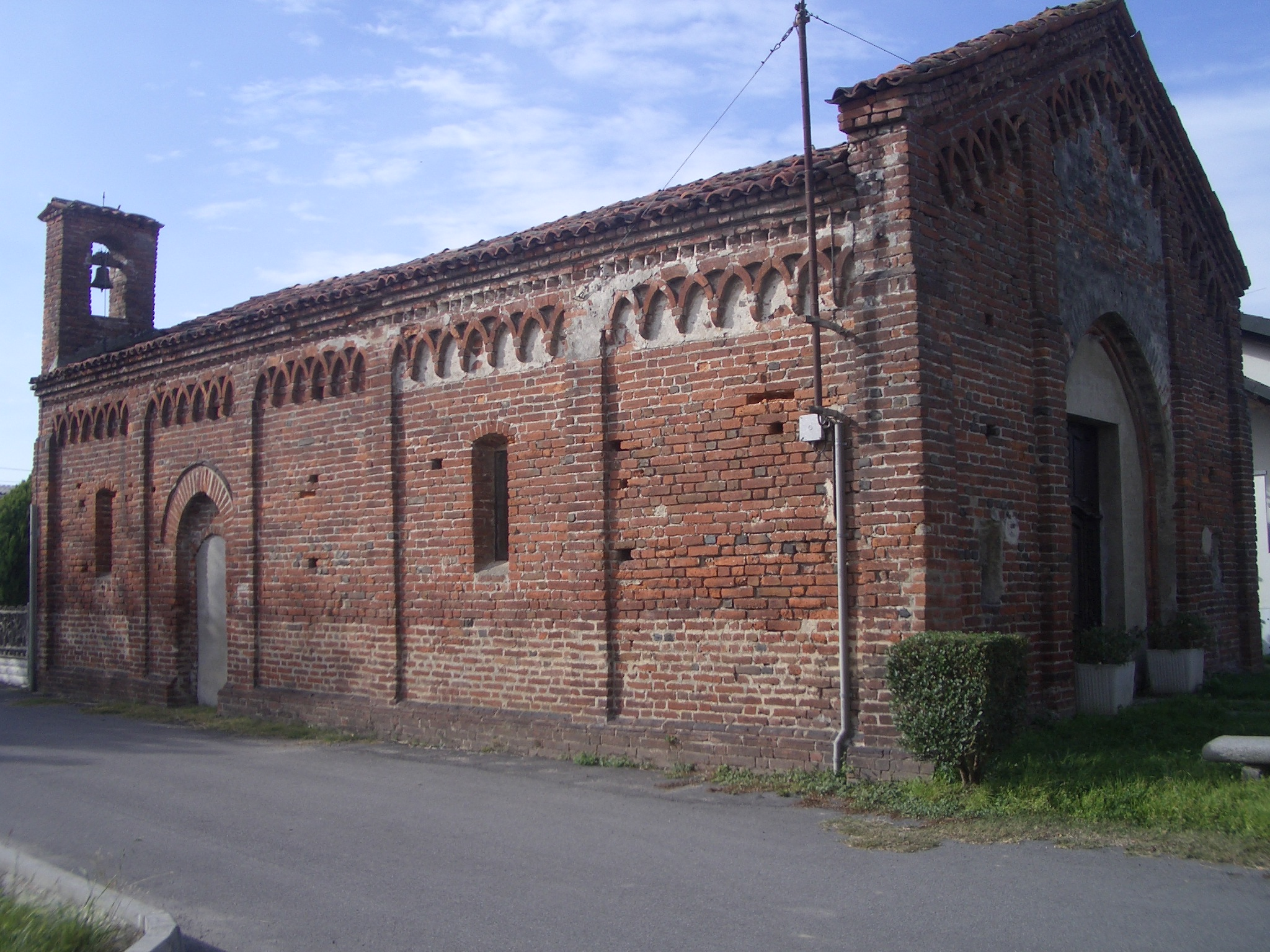 San Sebastiano oratory, Fontanetto Po, Vercelli, Italy